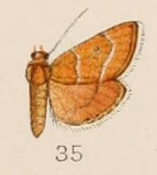 Cybolomia cervinalis Hampson 1908